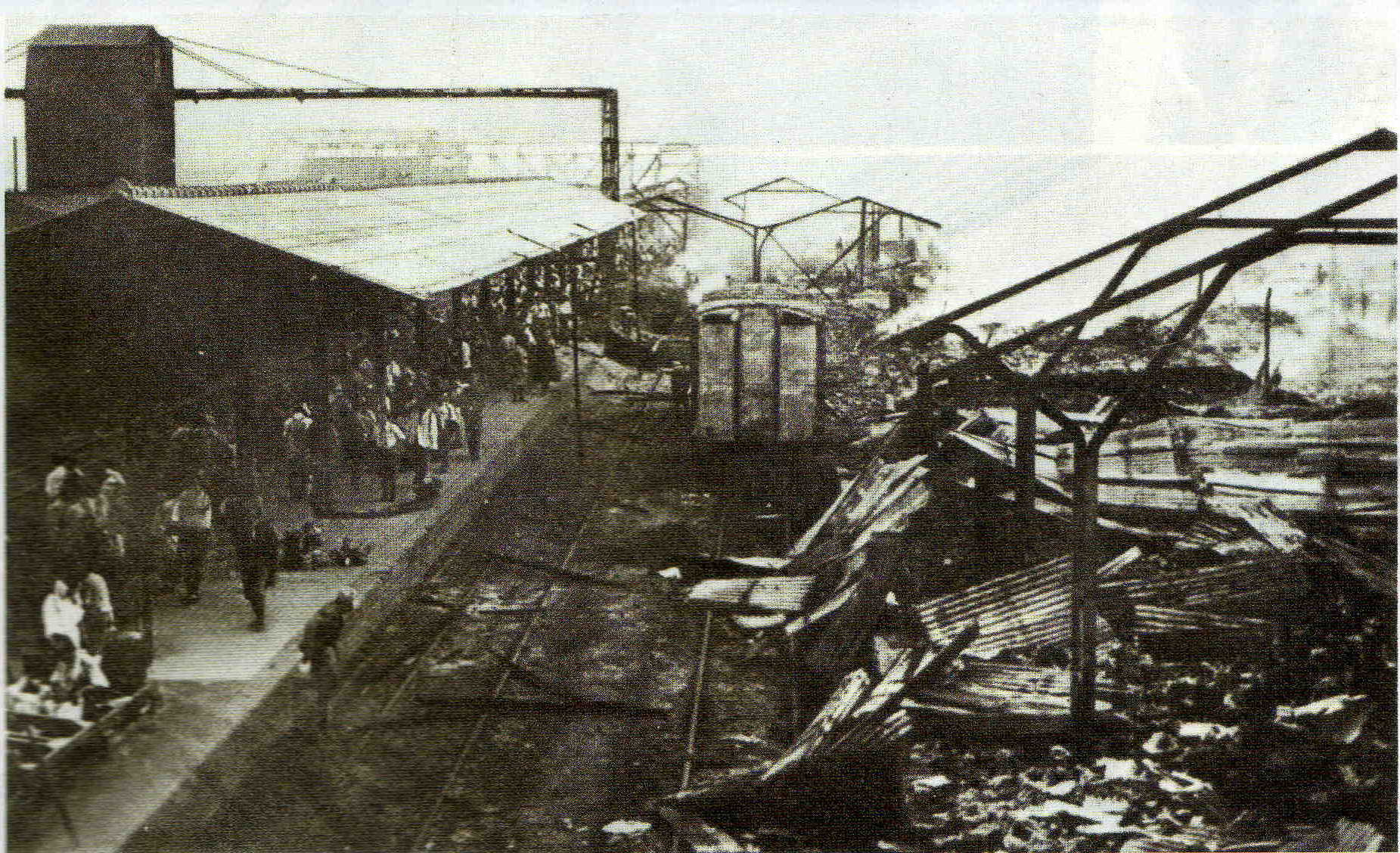 広島県福山市にある福山駅が1945年8月8日にアメリカ合衆国による空襲で被災した直後の写真。この写真は福山市で空襲を物語るものとして様々な書籍に引用されており、発表済みである。